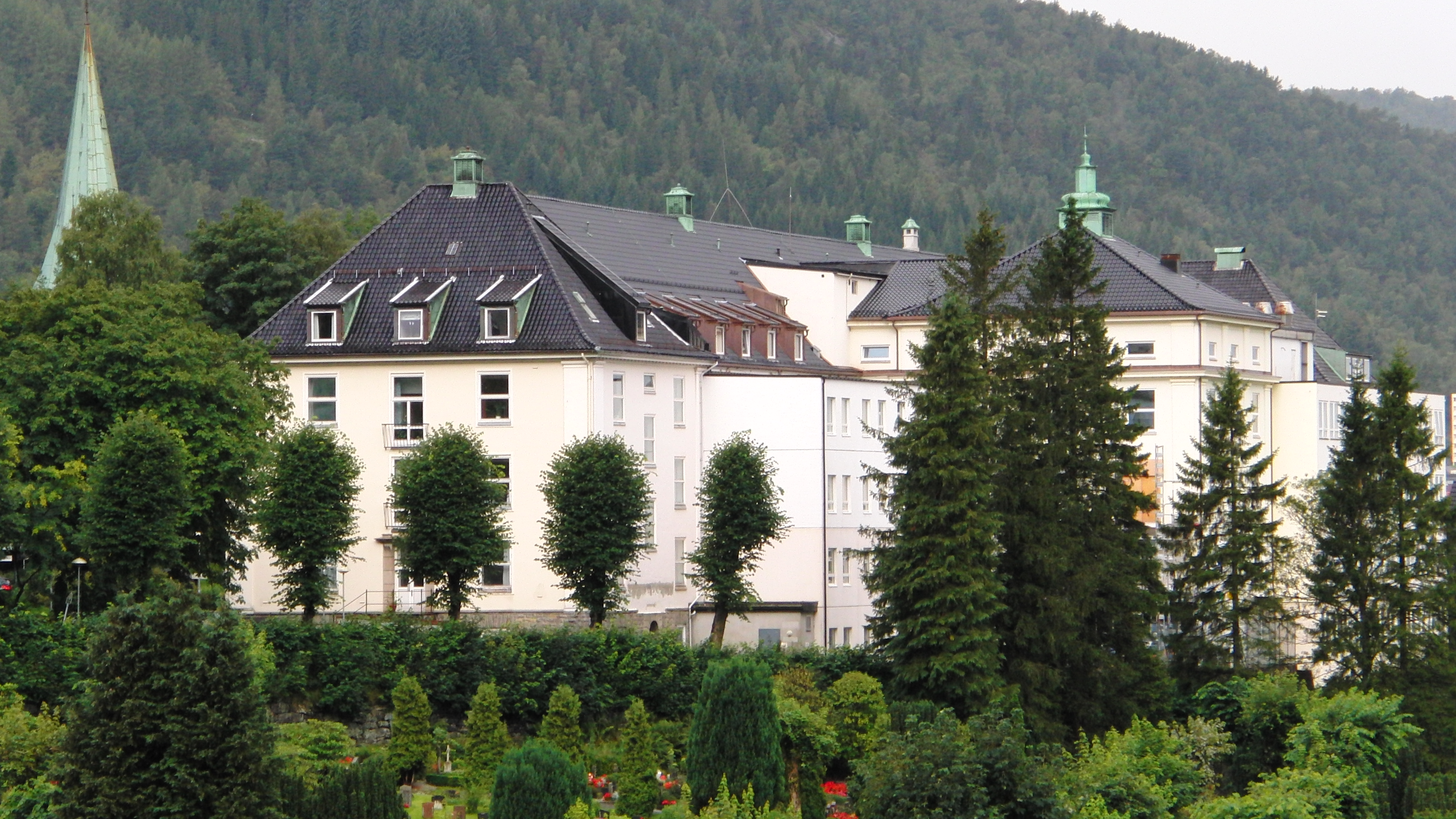 Description=Kvinneklinikken (Haukeland Universitetssykehus)